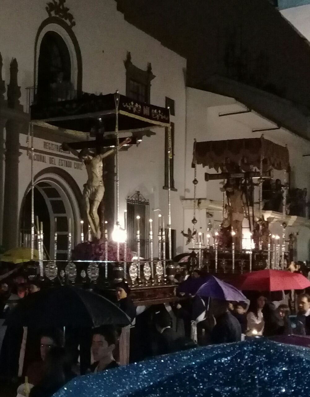 Acto de caracter religioso, realizado en la ciudad de Popayan.